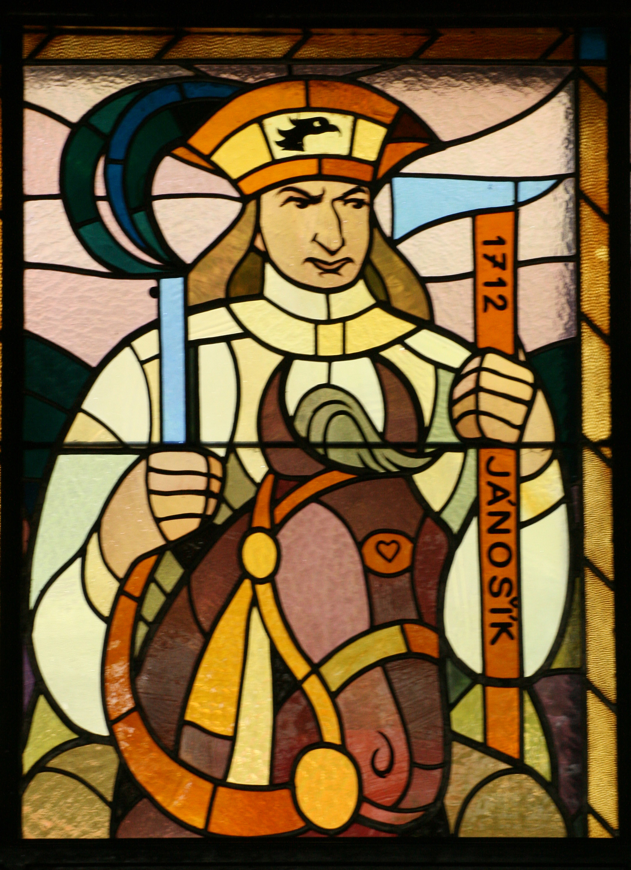 Autorom vitráže v interiéri PKO v Bratislave v roku 1957 bol národný umelec Janko Alexy